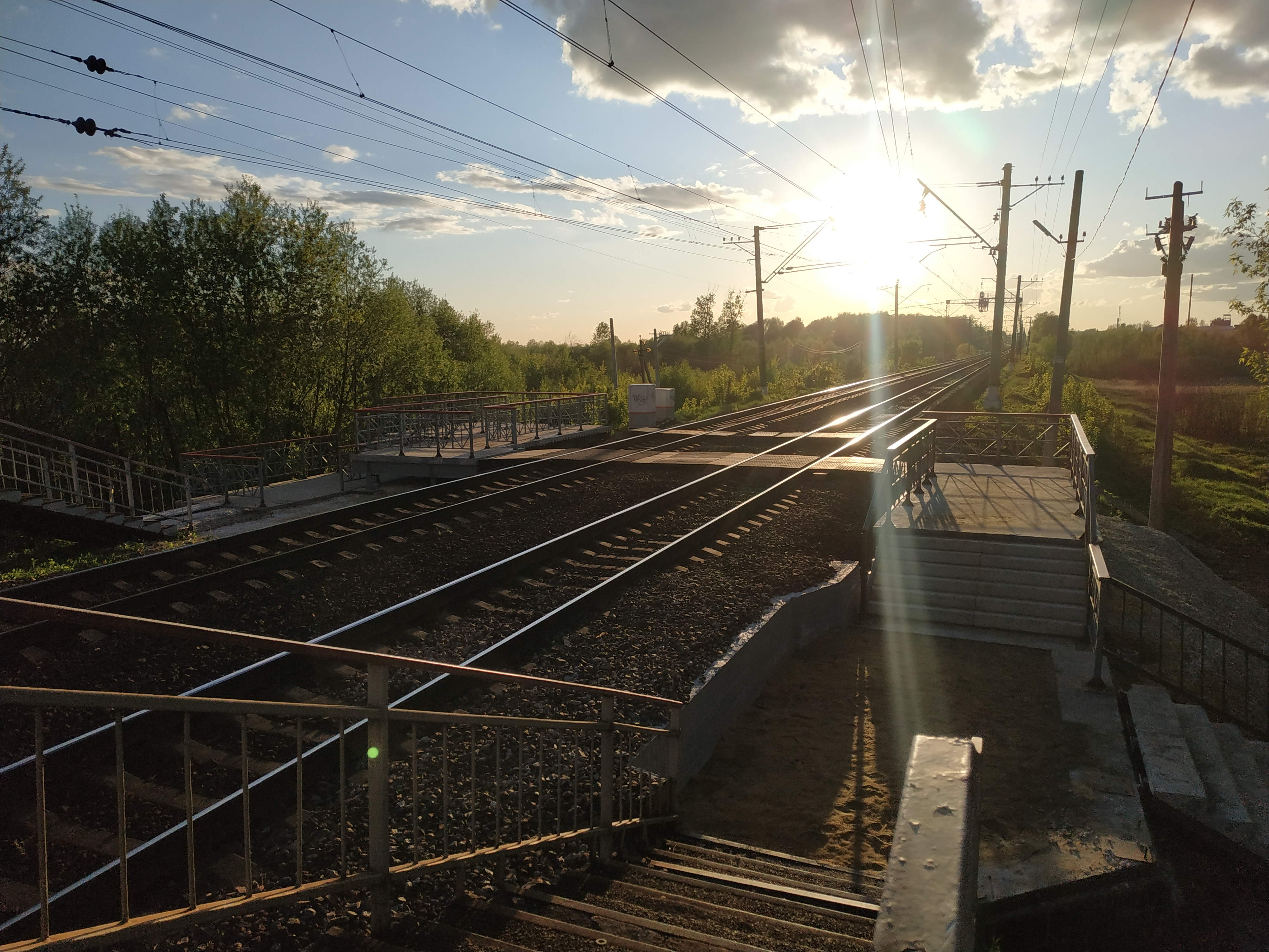 многочисленные лестницы. железнодорожная станция